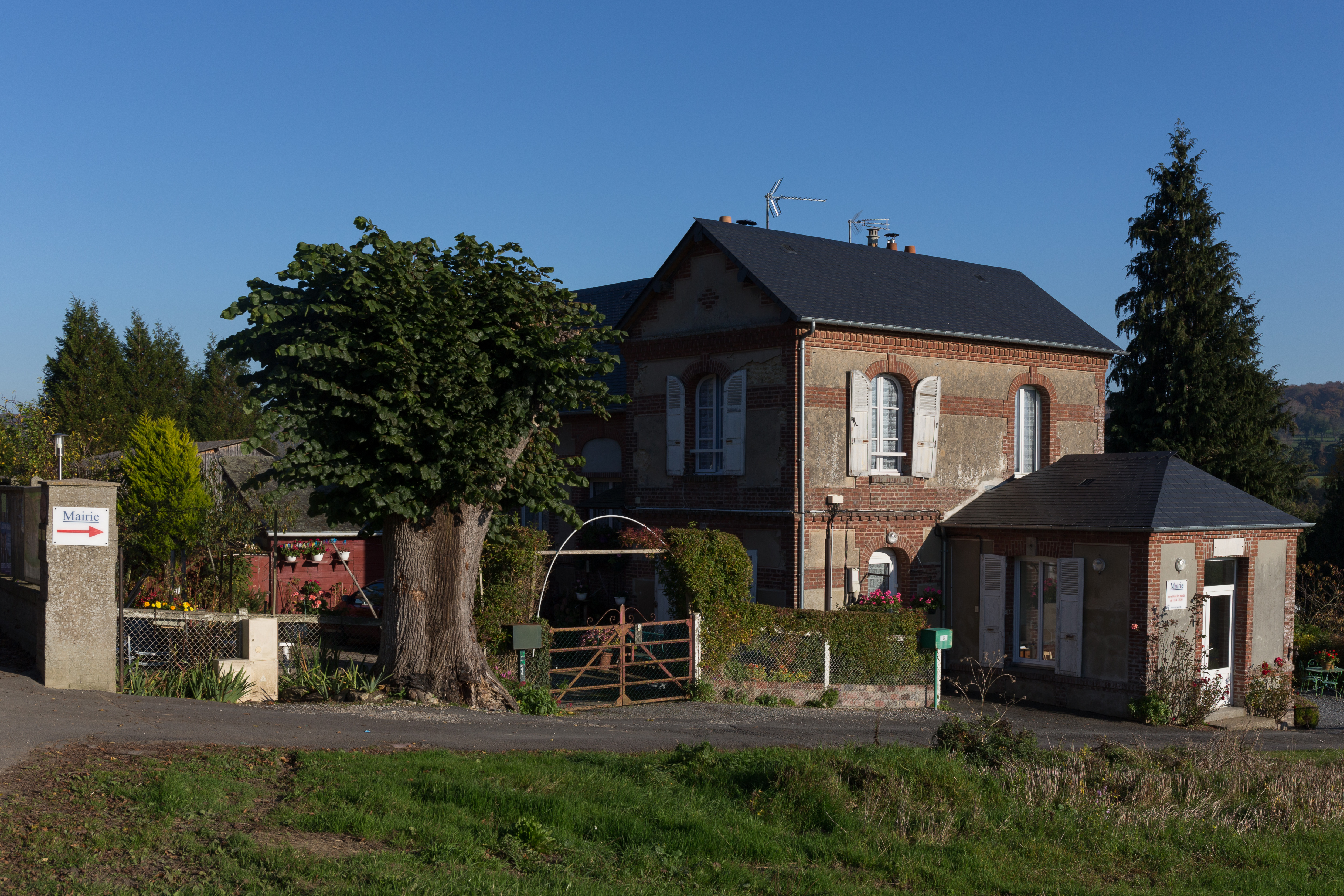 Mairie d'Englesqueville-en-Auge.